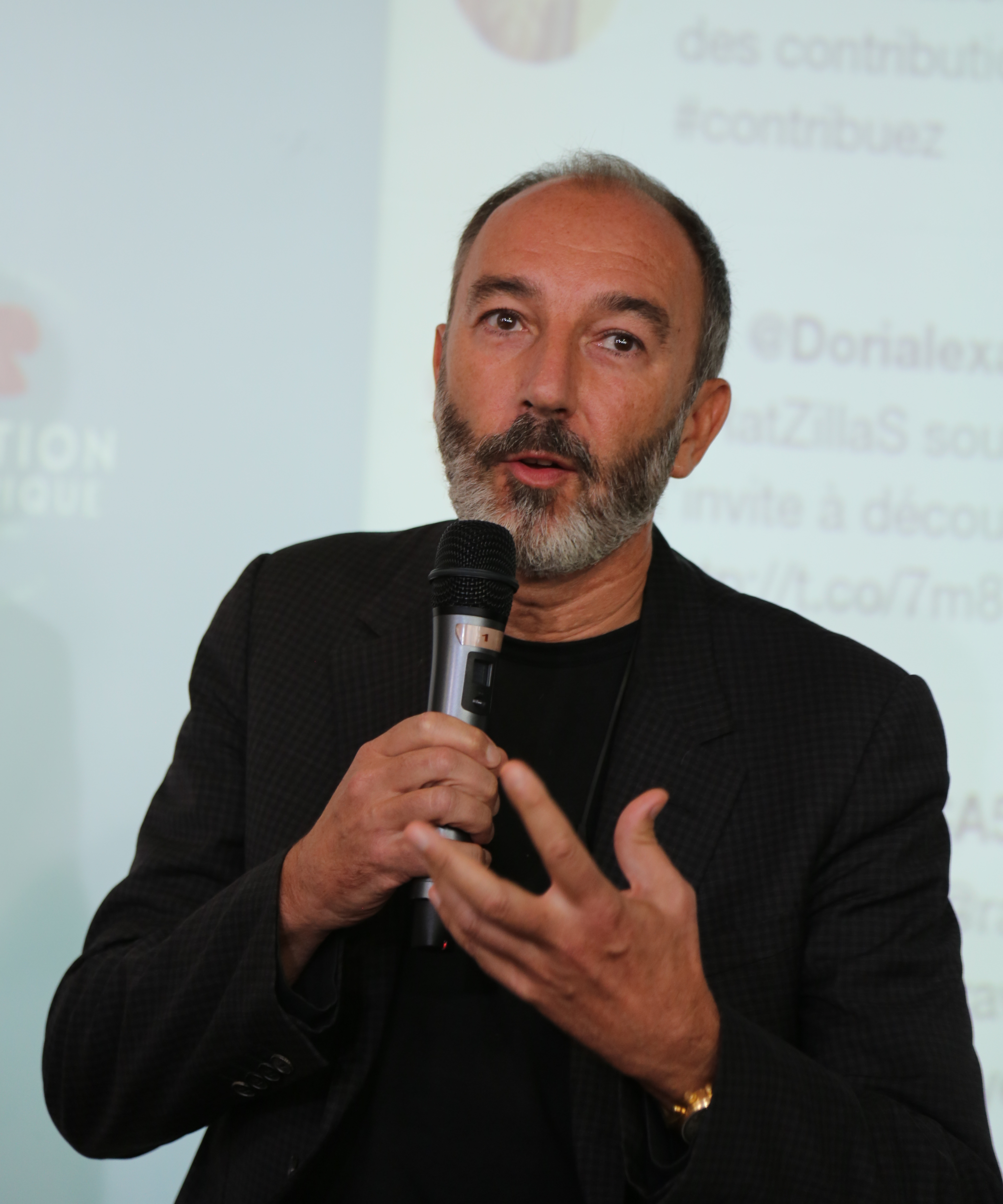 Lancement de la concertation numérique au NUMA, en présence de Manuel Valls Photos : Michel Briand